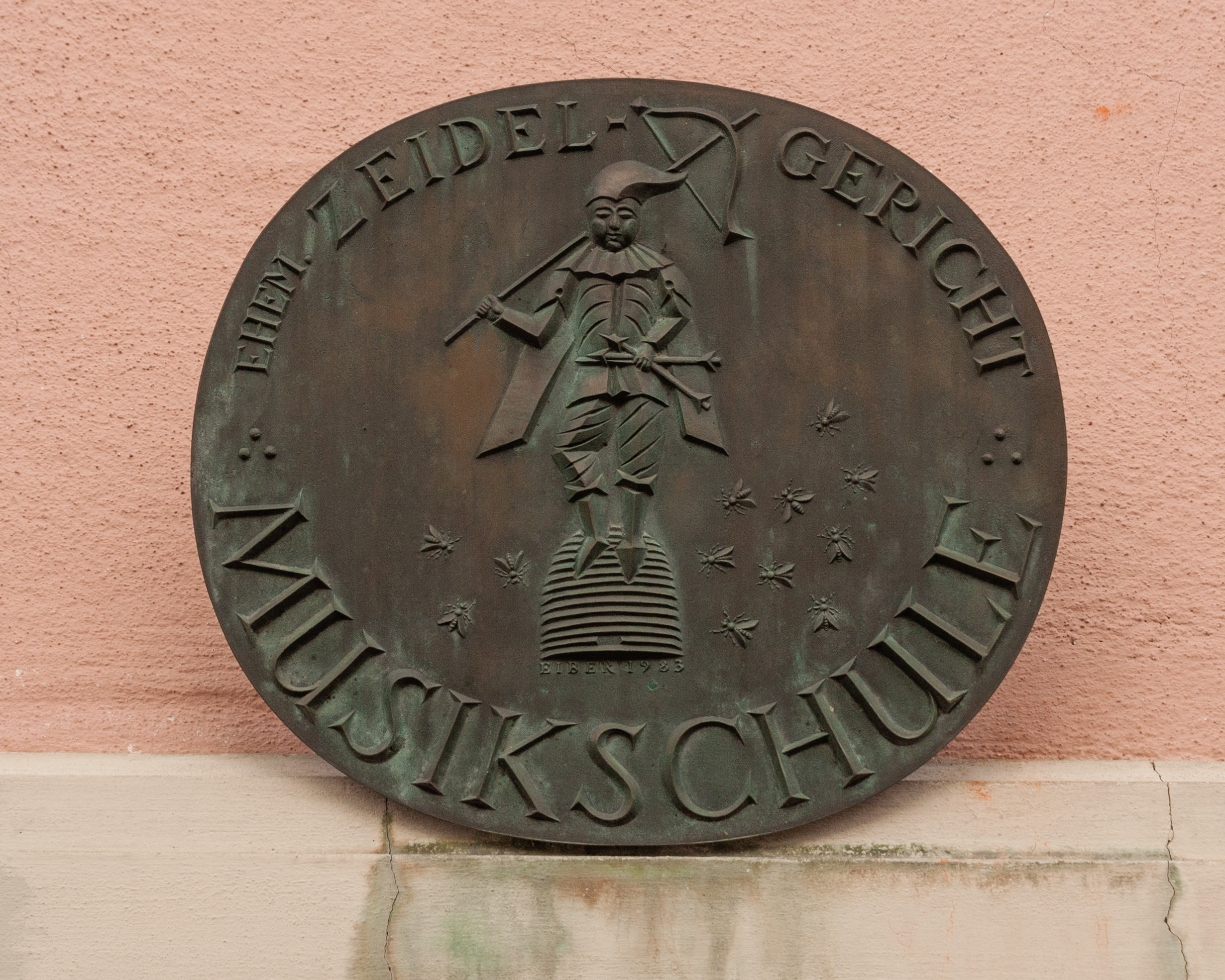 Zeidelgericht, Feucht, Logo, Musikbund Feucht